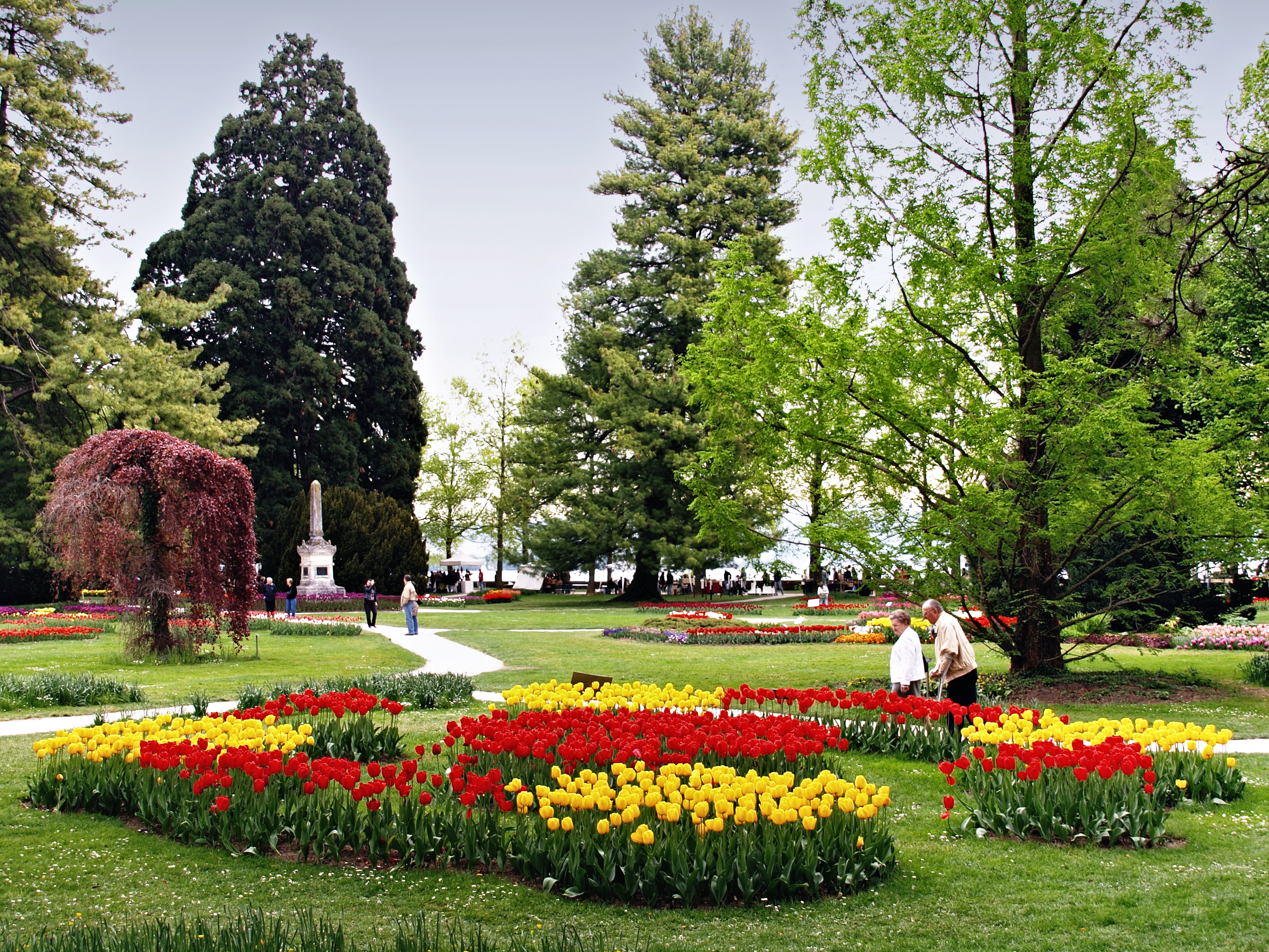 Morges (Suisse) - 39e Fête de la Tulipe au Parc de l'Indépendance